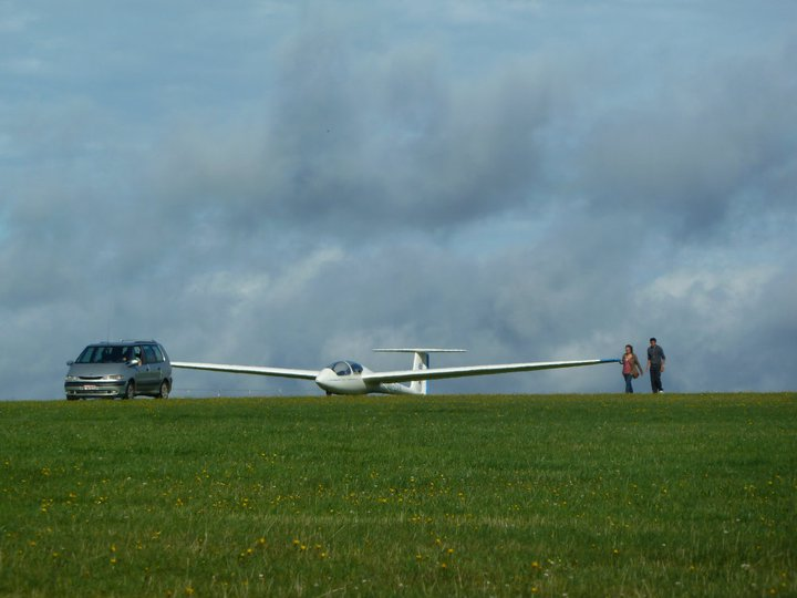 un planeur sur l'aérodrome de saint Hubert (EBSH)